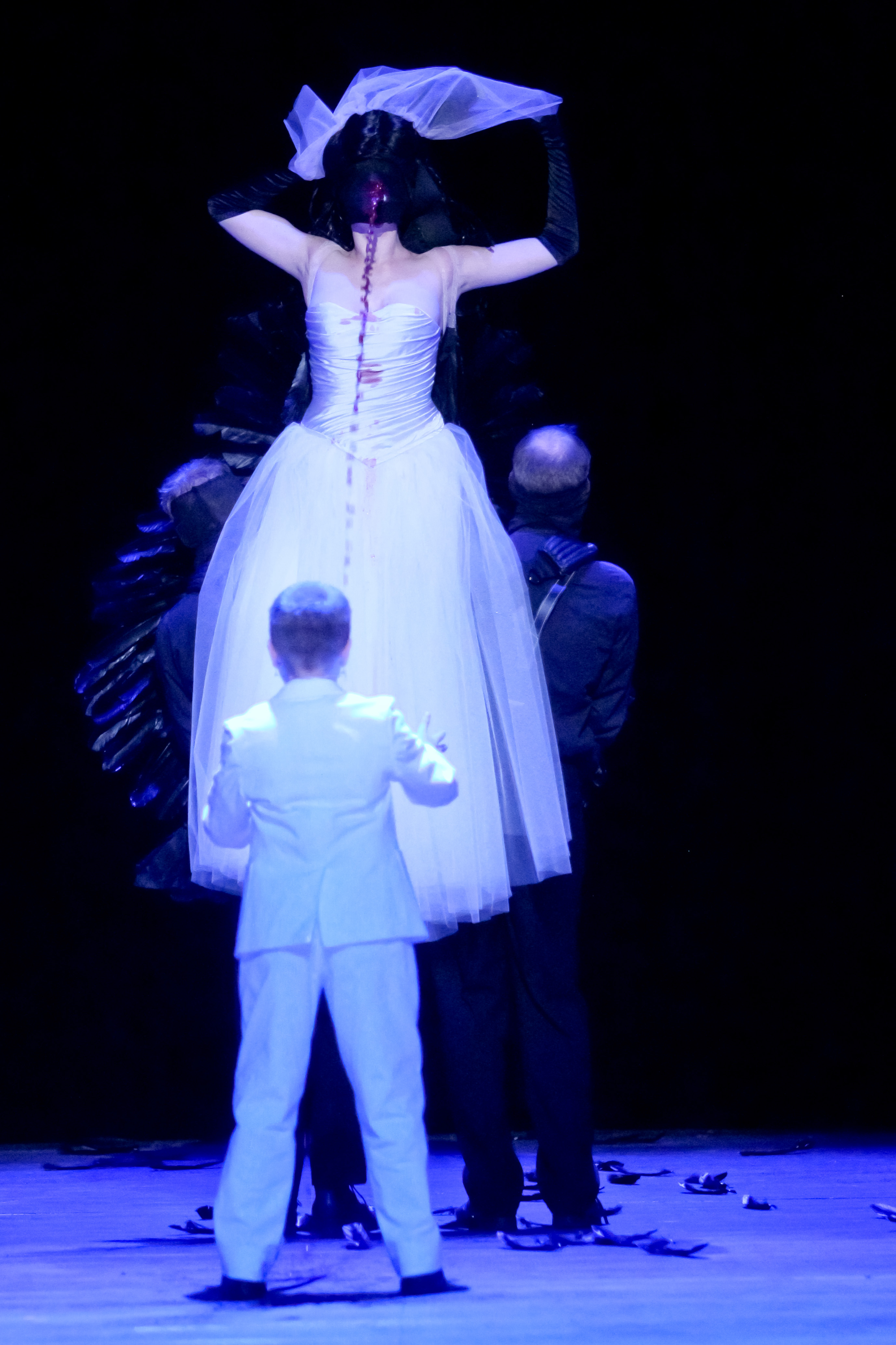 Der Freischütz, Regie: Aniara Amos für Theater Magdeburg